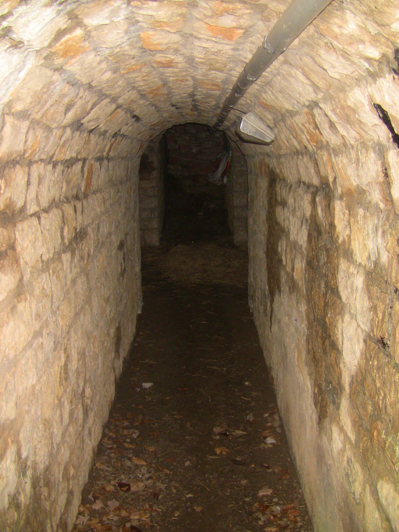 Entrées latérales d'un local de la batterie ouest du fort de planoise, à Besançon (Doubs, France).